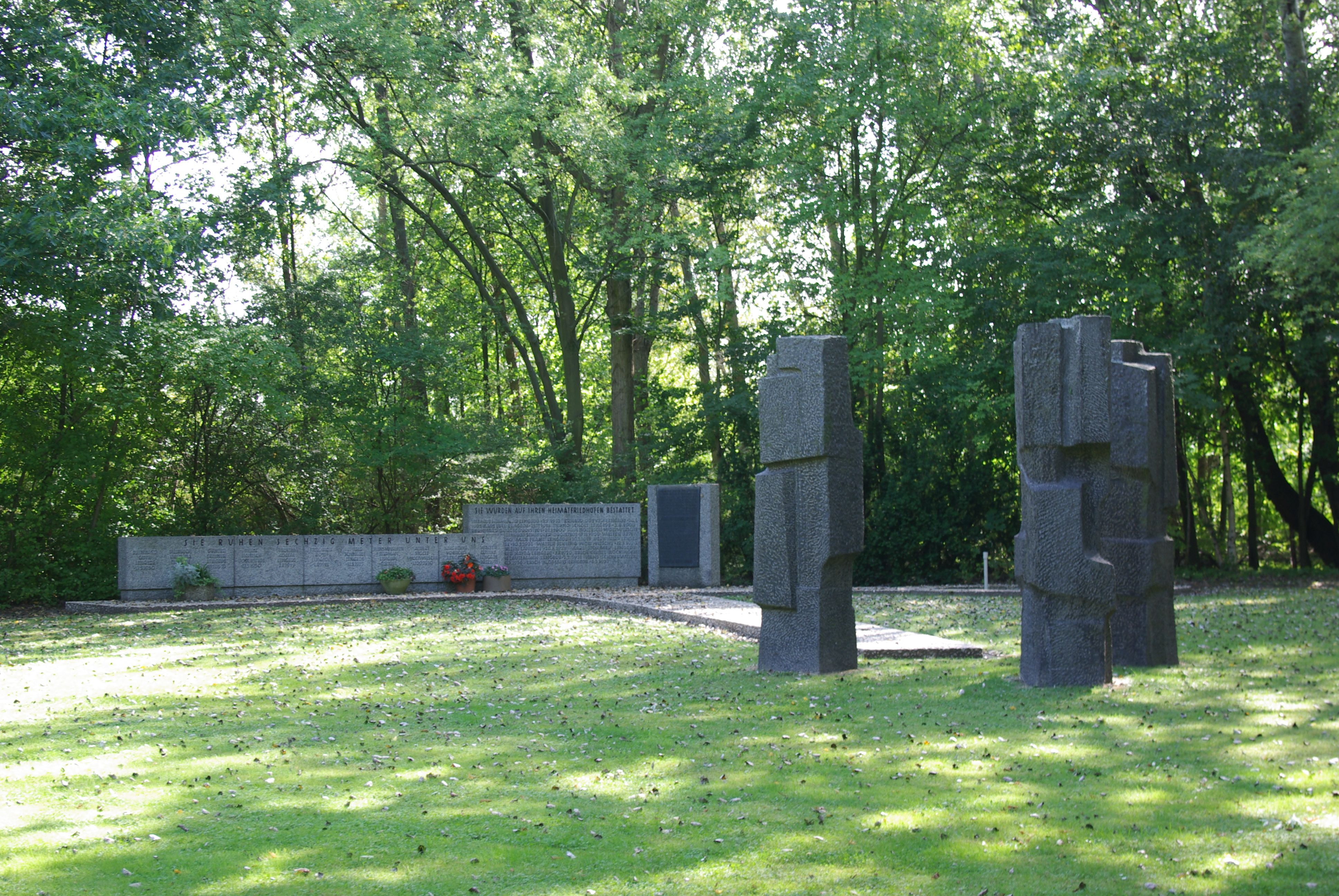 Lengede, Niedersachsen, Deutschland. Das Denkmal ist erbaut worden, um der Bergleute zu gedenken, die bei dem Grubenunglück 24. Oktober 1963 umkamen.